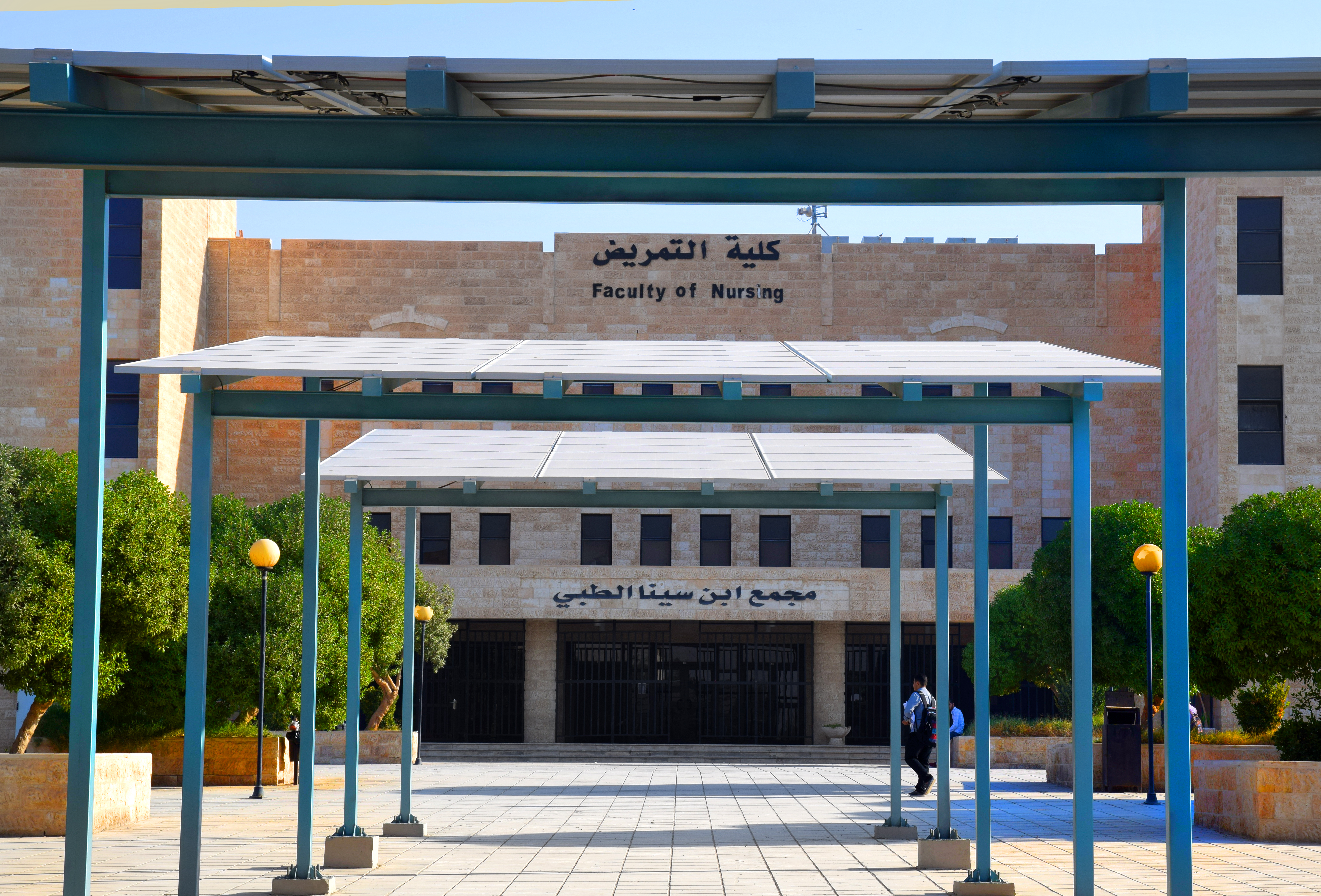 الهاشمية